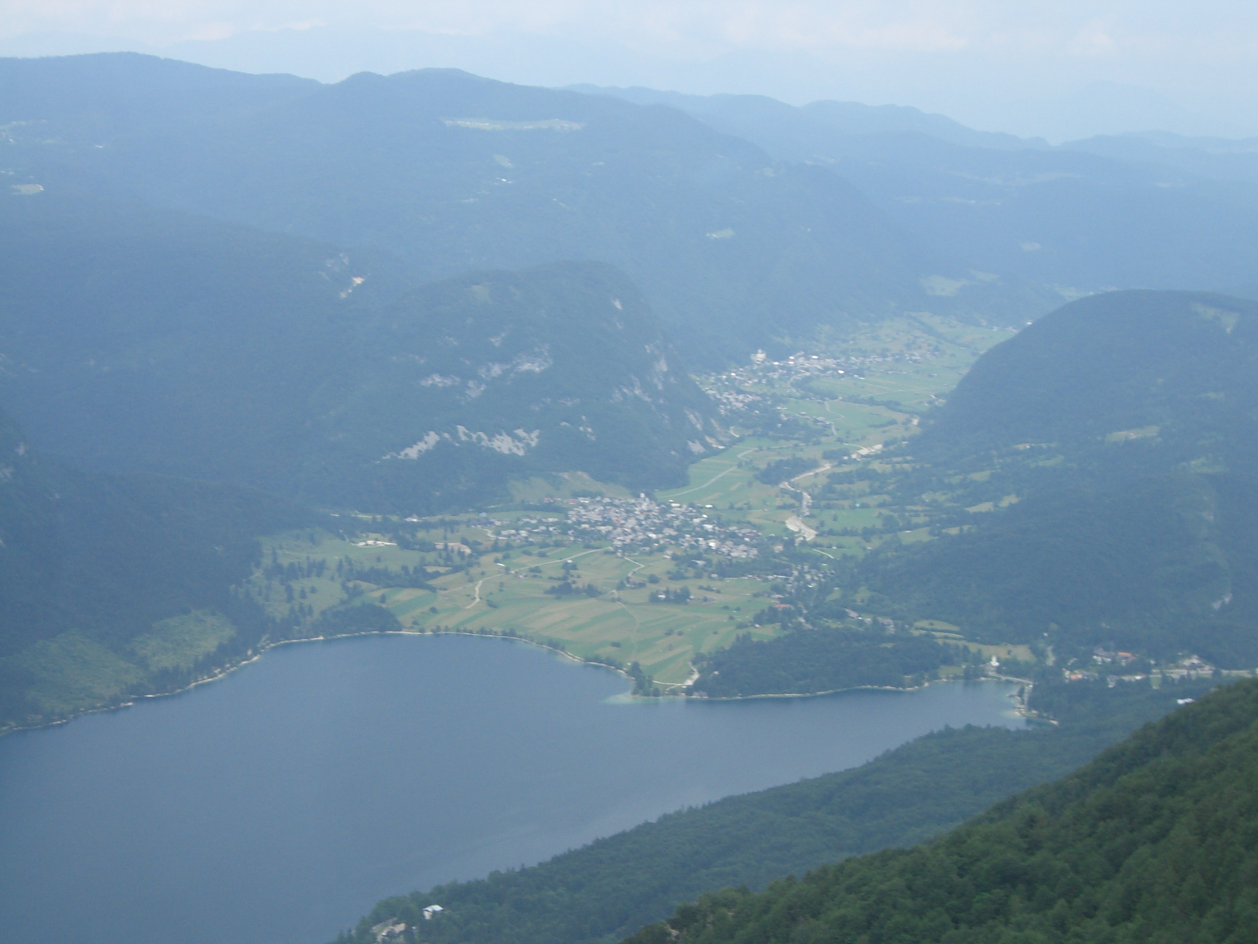 Lake Bohinj, Slovenia